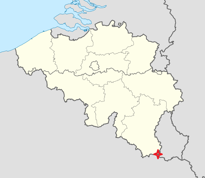 Carte du tripoint frontalier entre la France la Belgique et le Luxembourg.